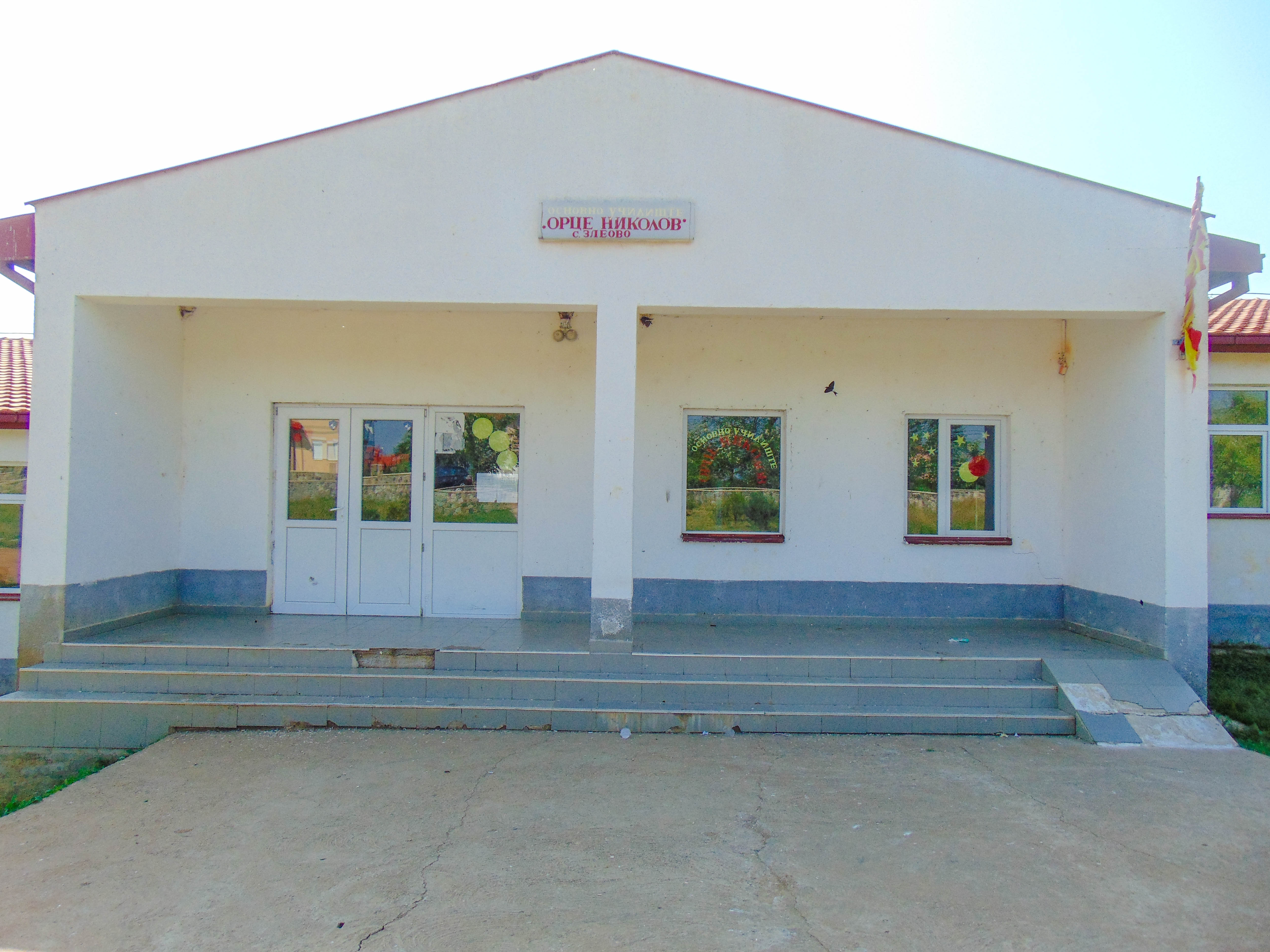 ОУ „Орце Николов“ – Злеово